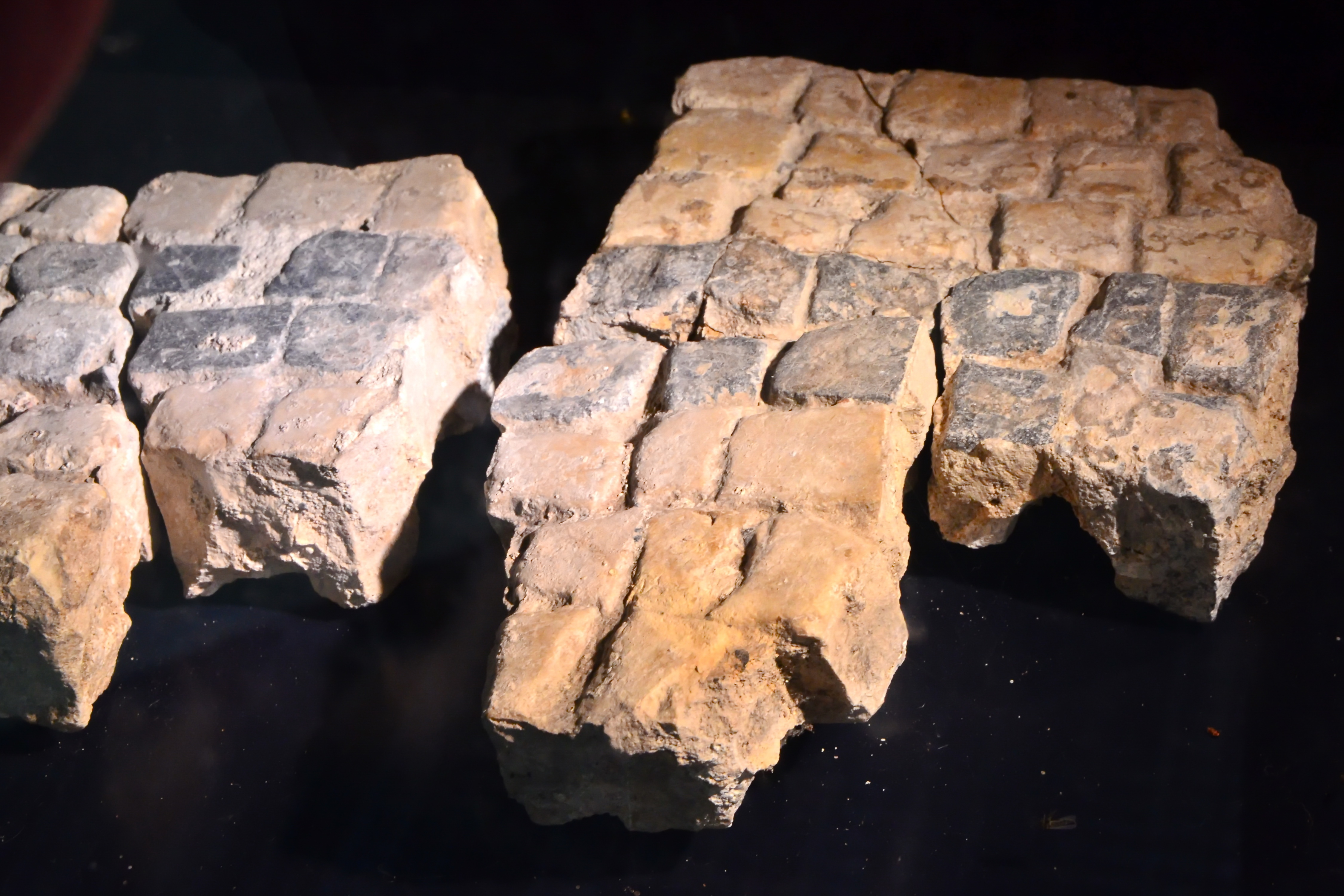 Exponat aus der Thermengasse im einstigen römischen vicus Turicum (Zürich) : Mosaikreste mit einfachem Schwarz-Weiss-Dekor aus Kalkstein aus dem Bad II. (gemäss Beschriftung in der Vitrine)